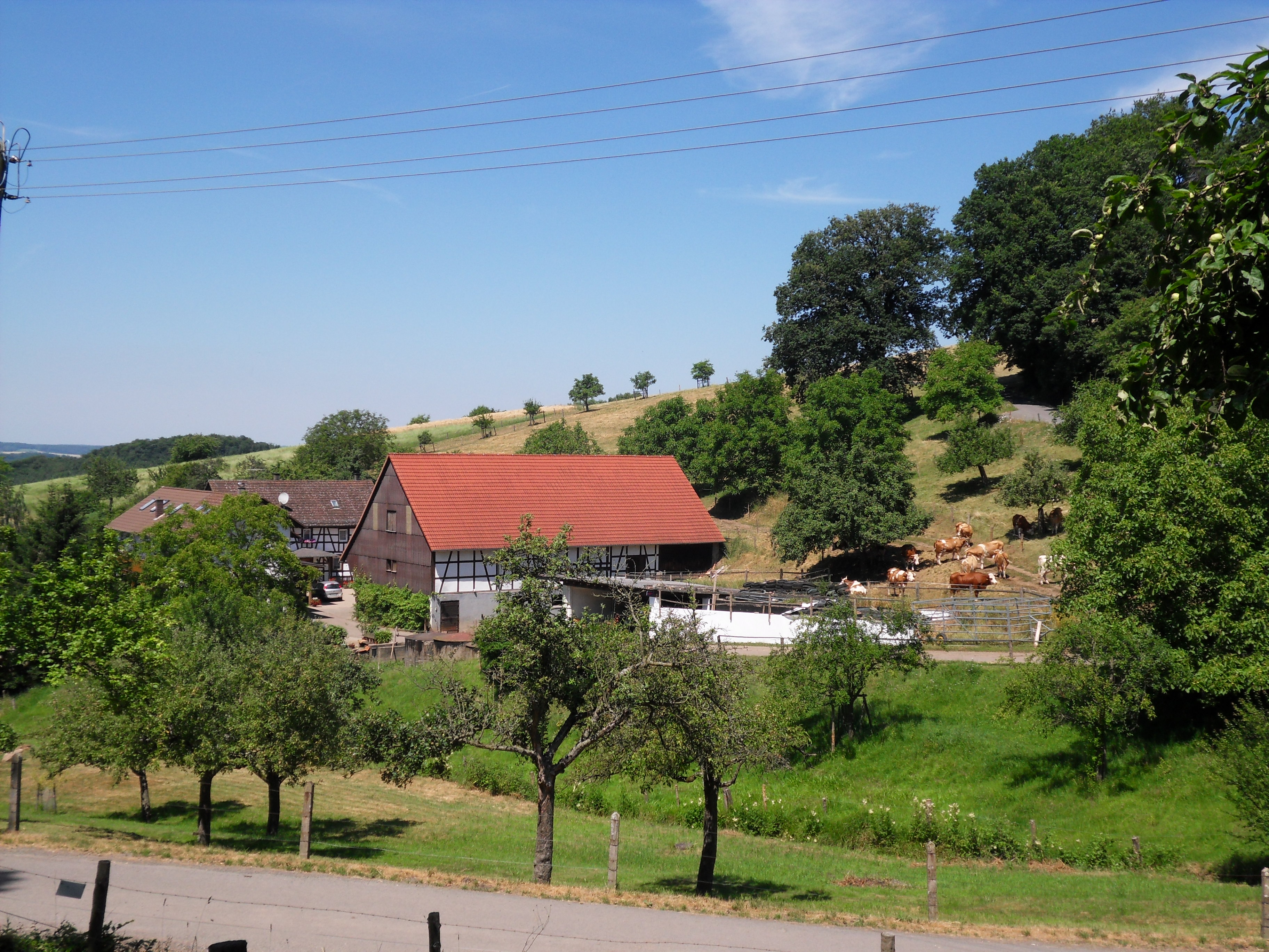 Nördlicher Hof des Weilers Kilsbach im nördlichen Odenwald mit einer Herde Fleckvieh